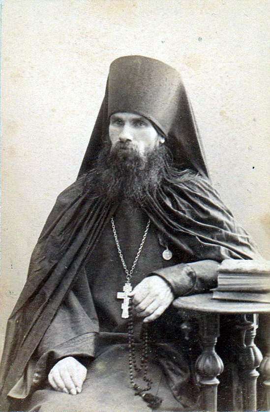 насельник Белогорского монастыря иеромонах Варлаам